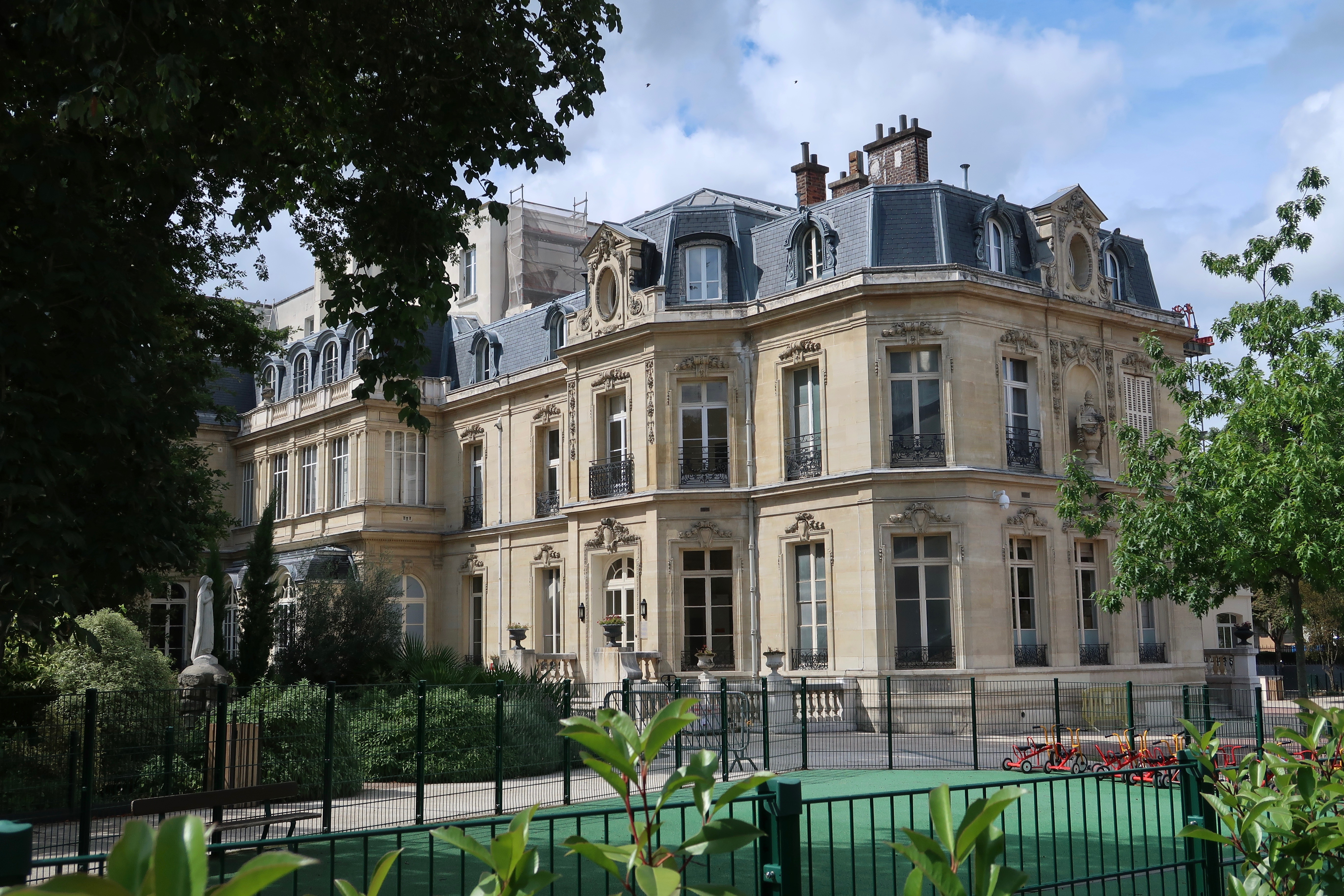 École et collège Dupanloup, avenue Robert-Schuman à Boulogne-Billancourt (Hauts-de-Seine).